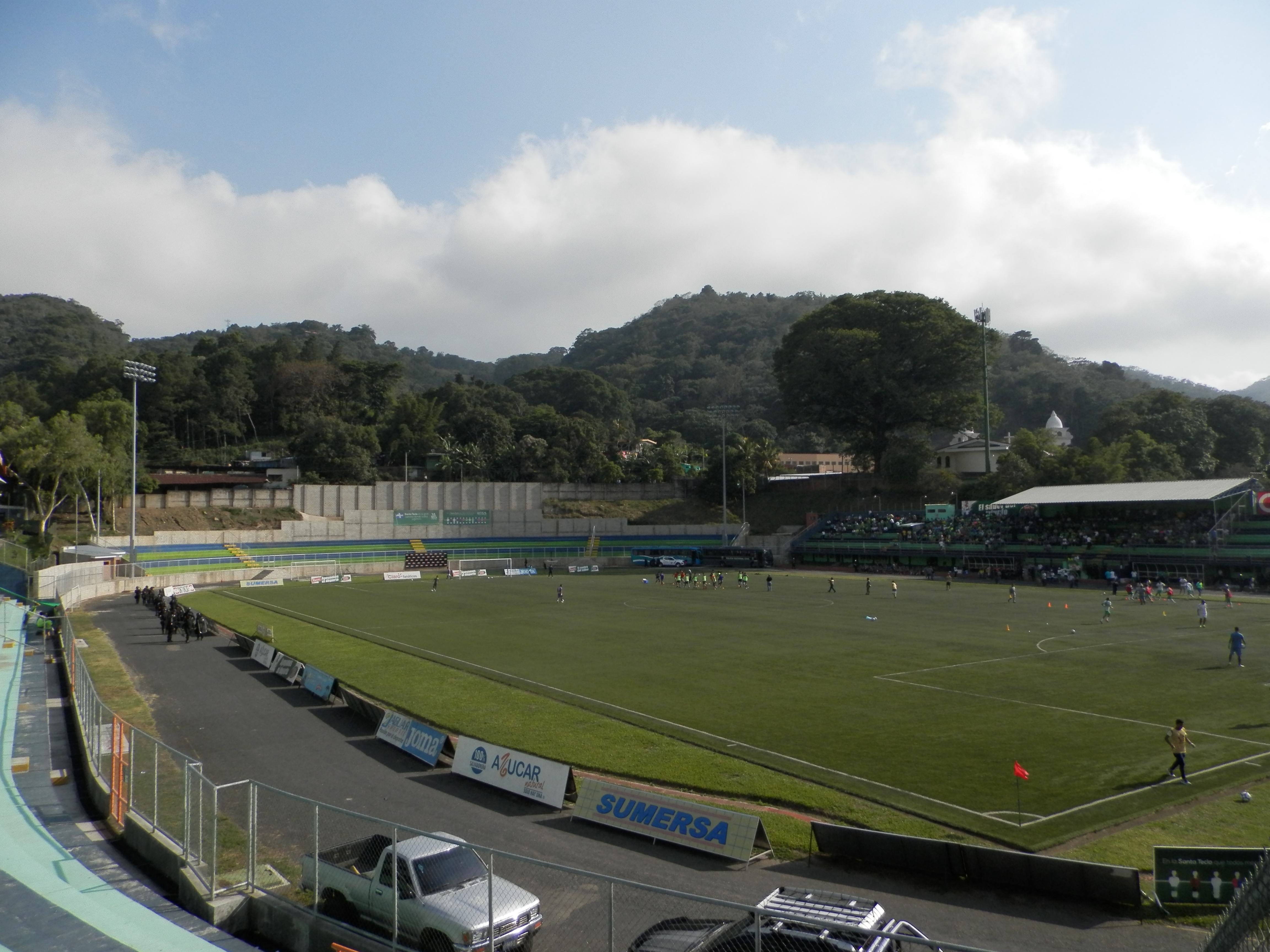 Vista del estadio las delicias